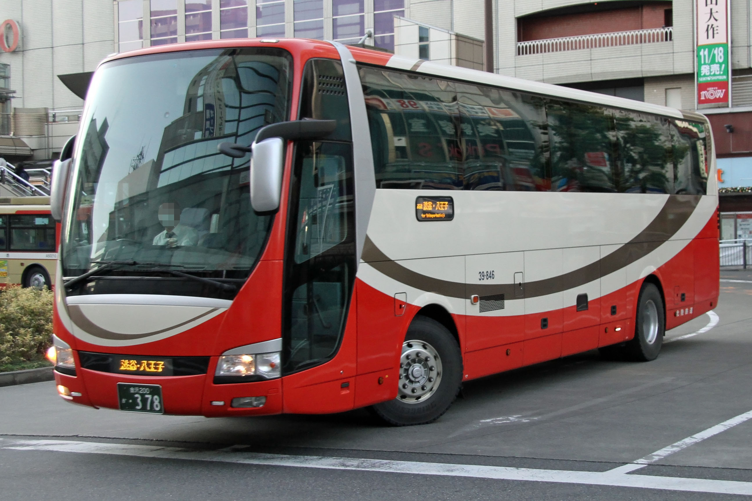 Hokuriku Railroad's expressway bus (Kagaonsen - Kanazawa - Shibuya - Hachioji) 北陸鉄道の高速バス車両（加賀温泉・金沢 - 渋谷・八王子線）